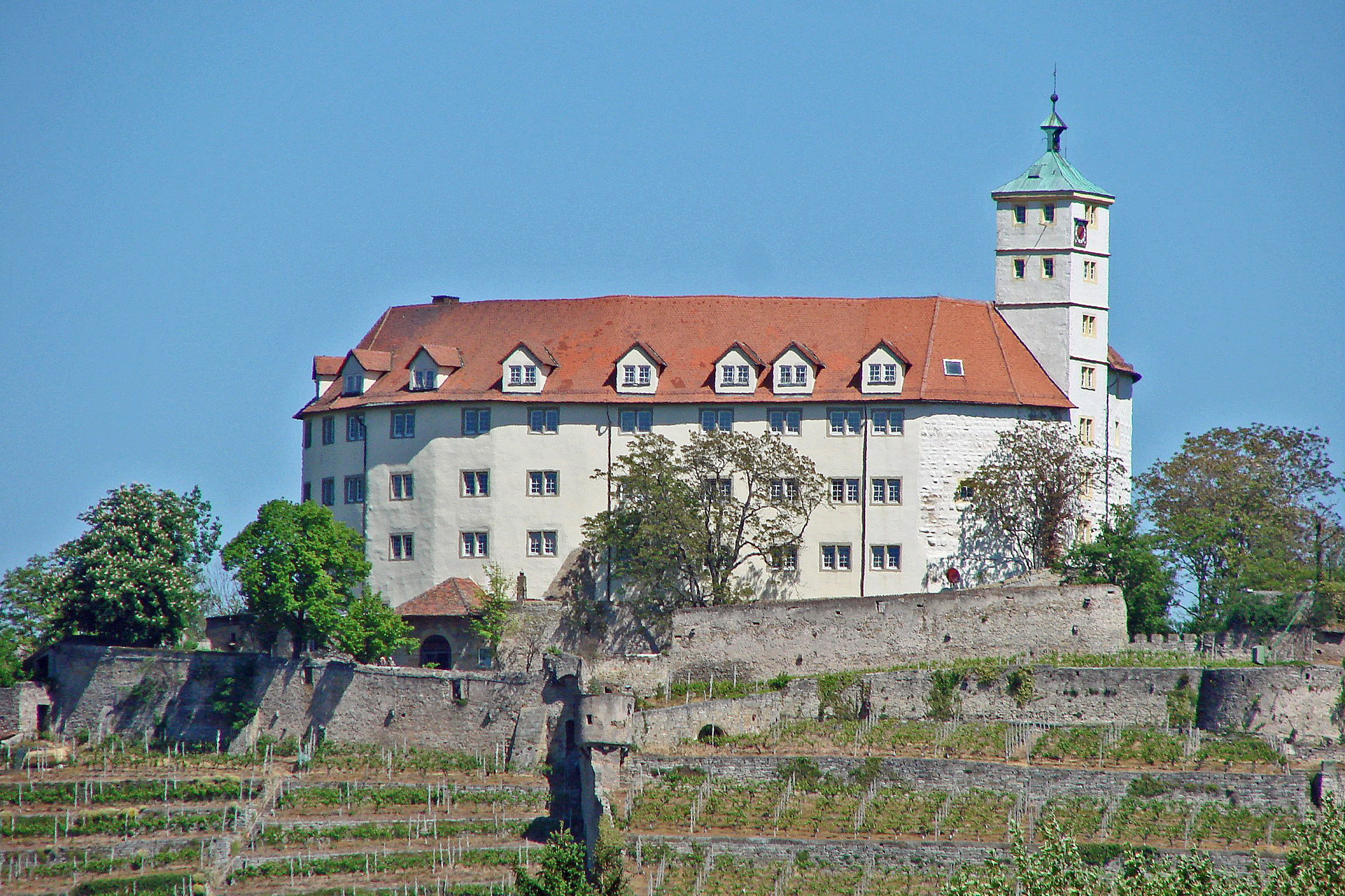 Vaihingen an der Enz, Kaltenstein castle